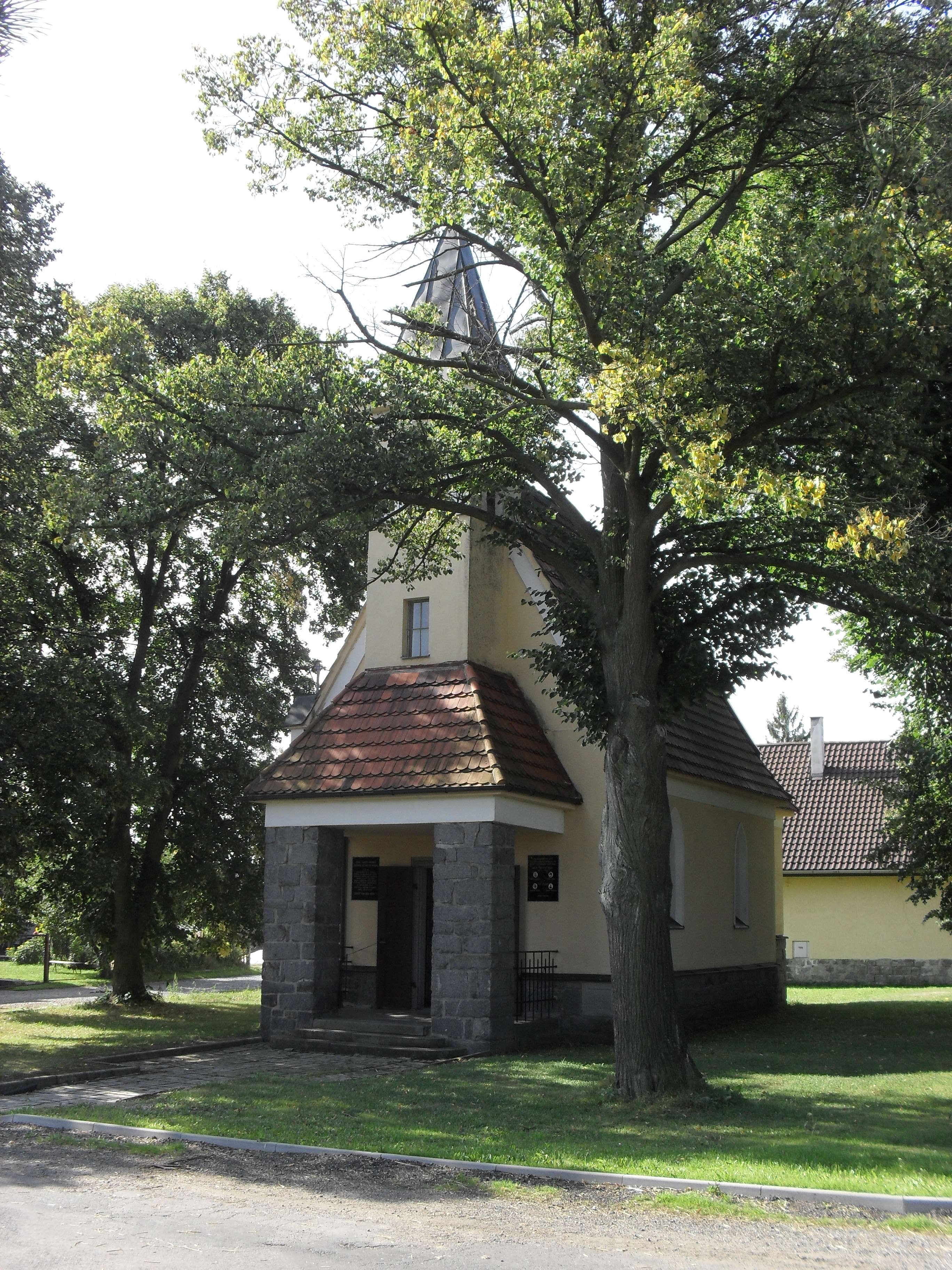 Fotografie pořízena v obci Jetenovice.